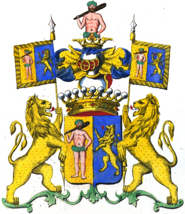 Armoiries de la famille de Sauvage Vercour